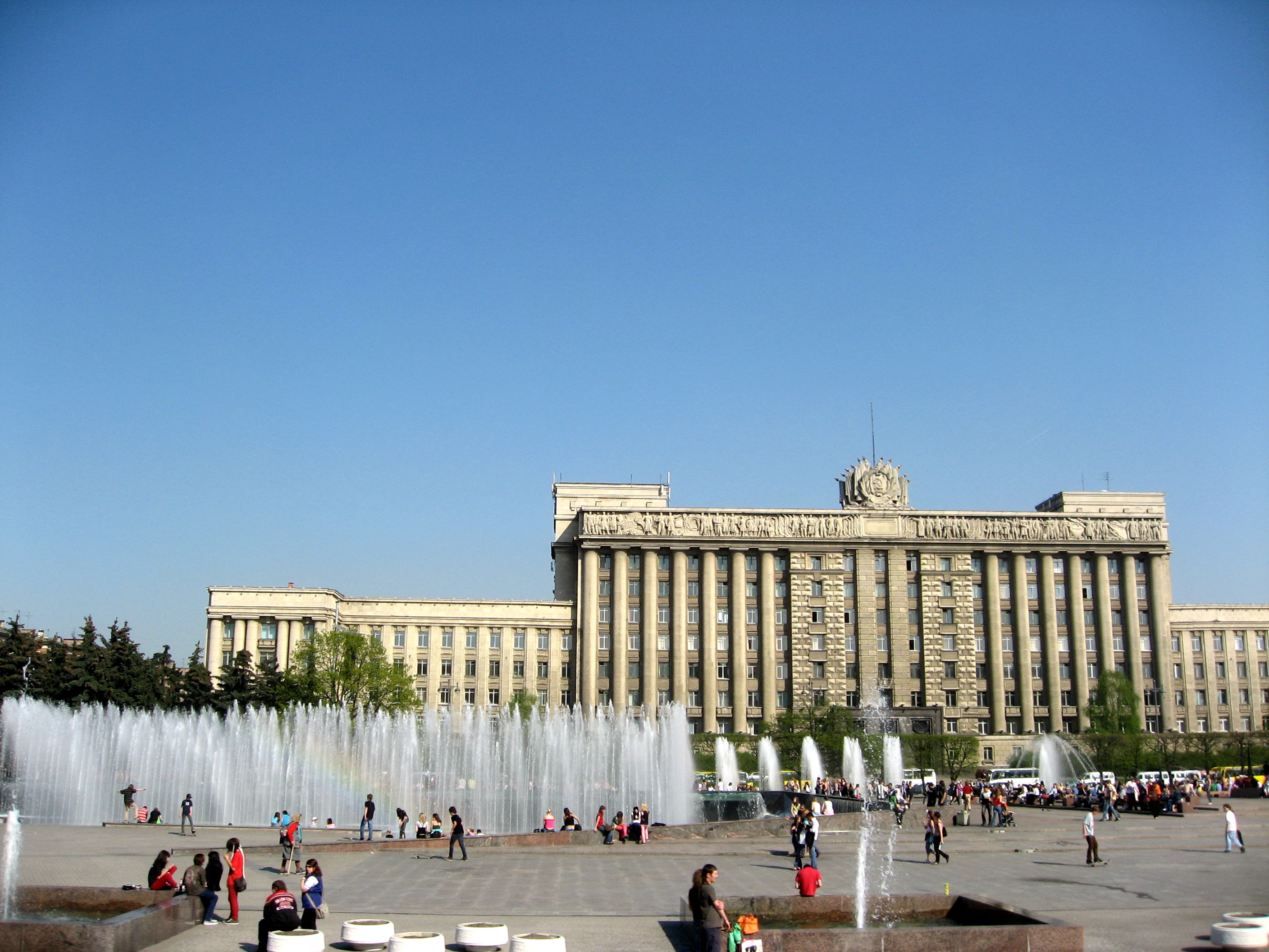 Sankt-Petěrburg (Petrohrad)